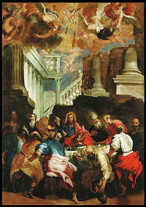 ultima cena gesù verolanuova basilica san lorenzo